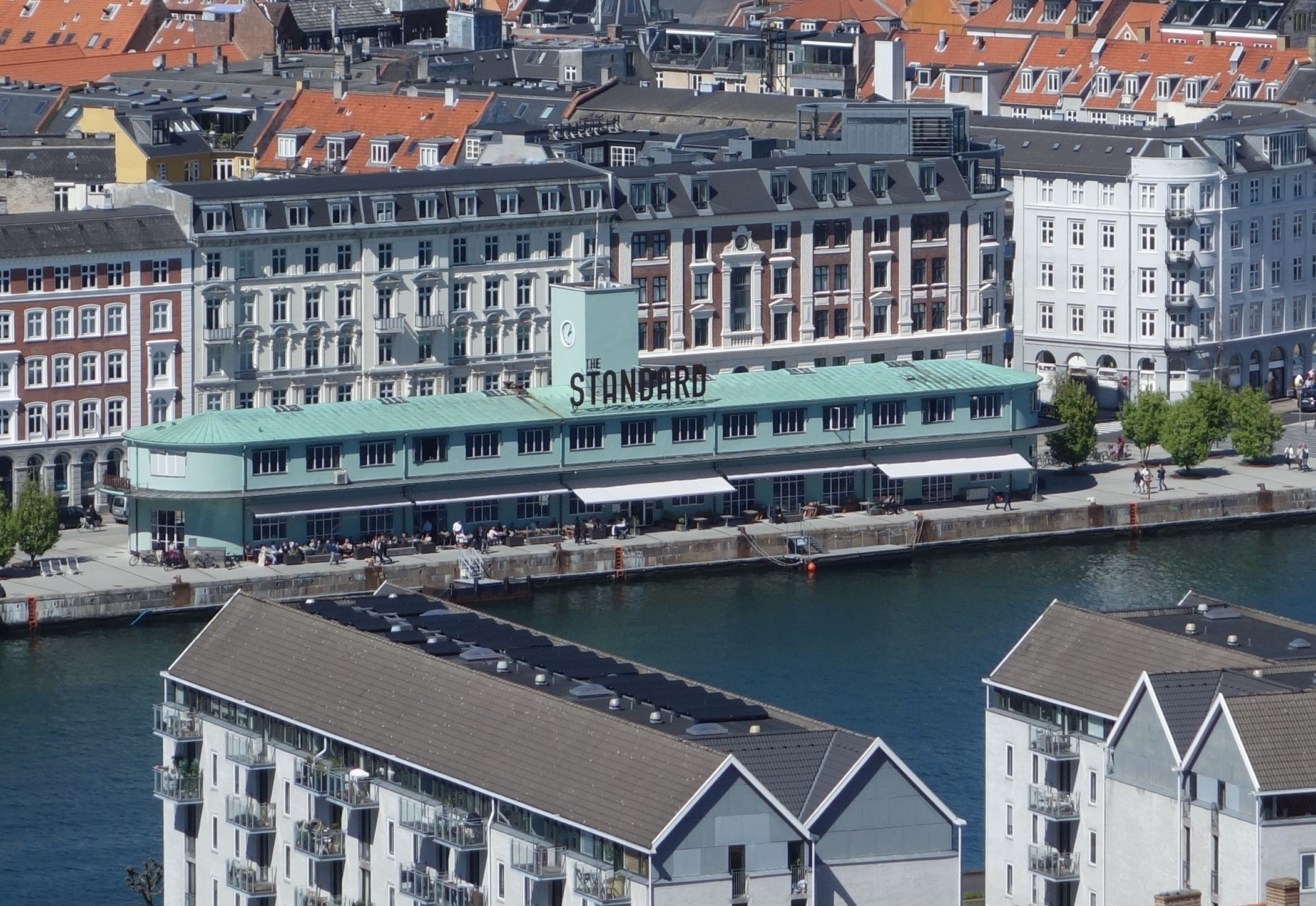 The Standard in Copenhagen, Denmark